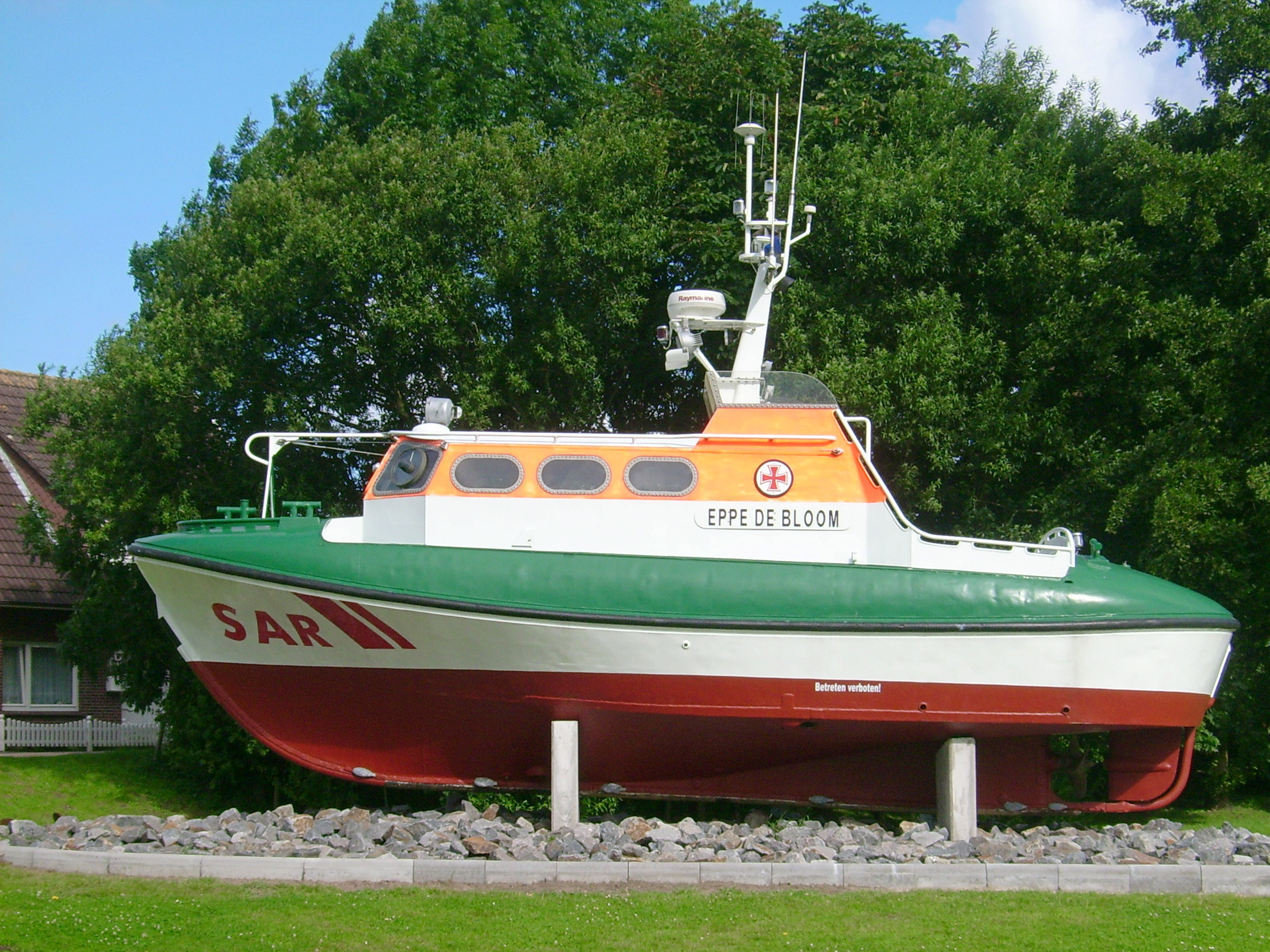 Rettungsboot in Dornumersiel